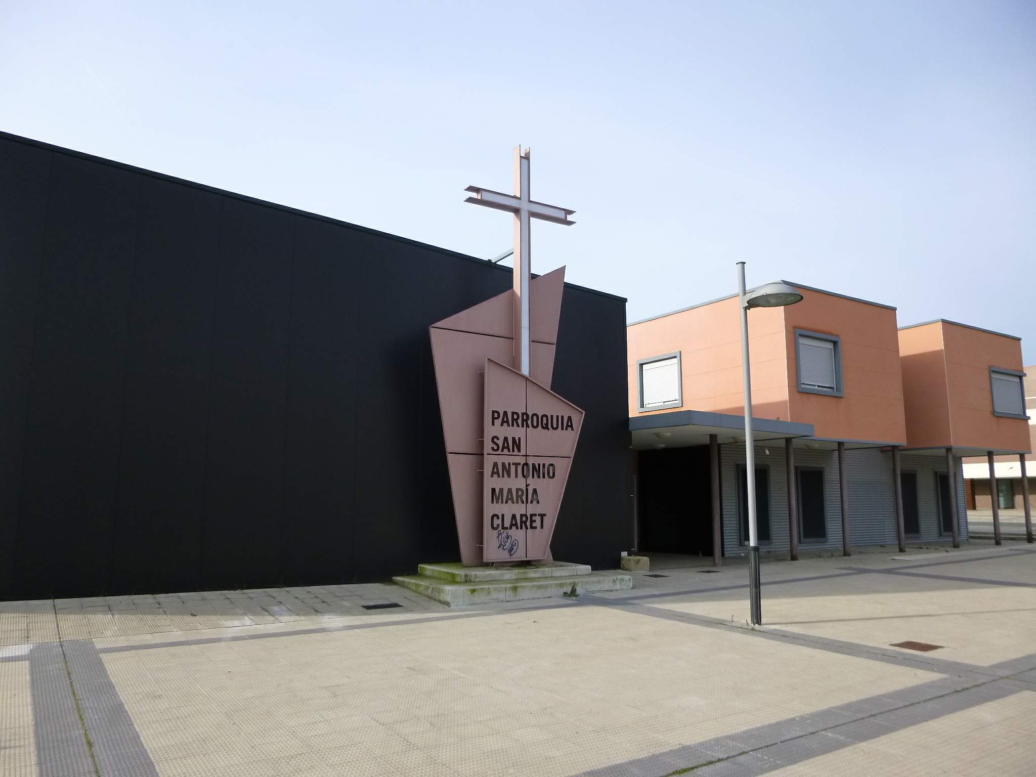 Iglesia de San Antonio María Claret (Pamplona)